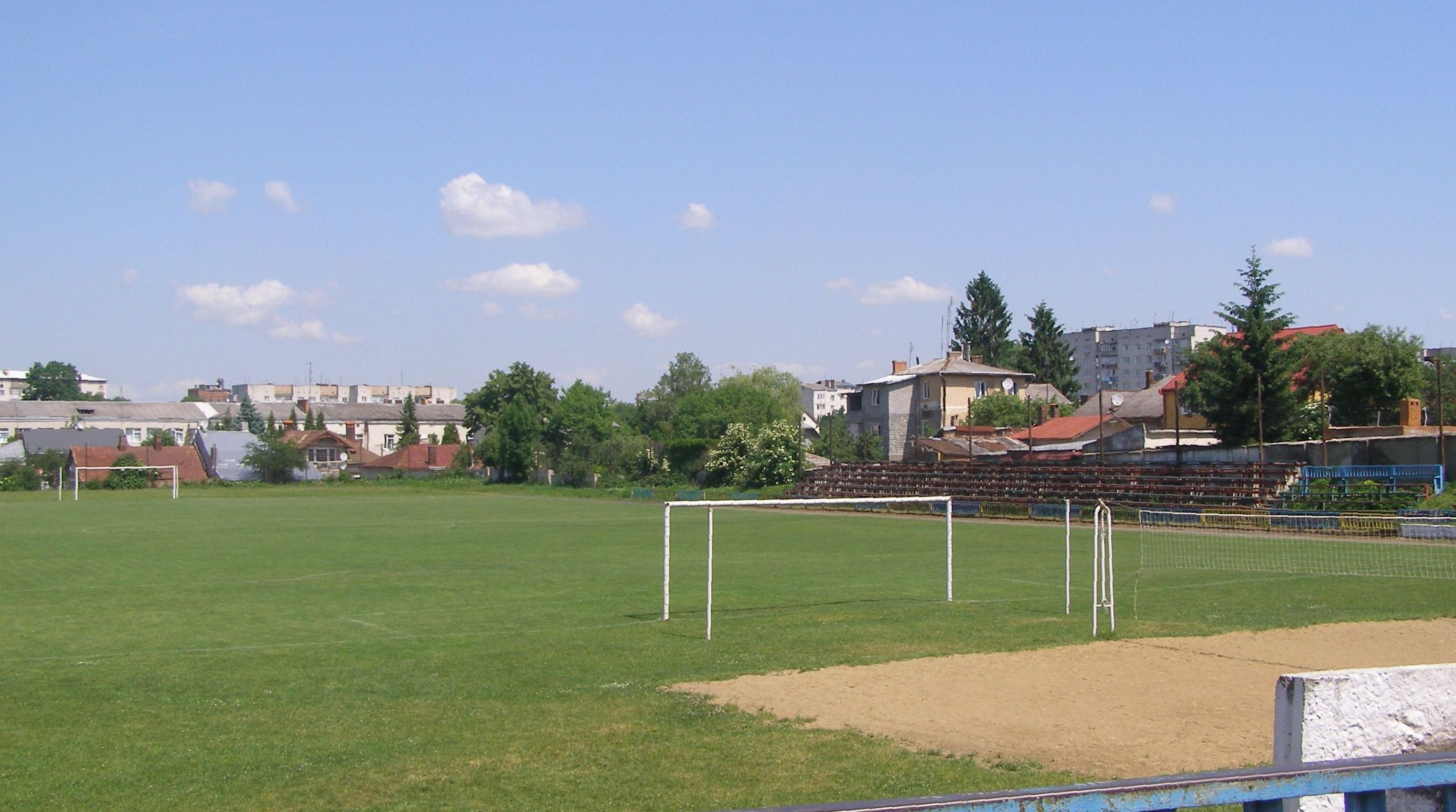 Dnister-Stadion in Sambir